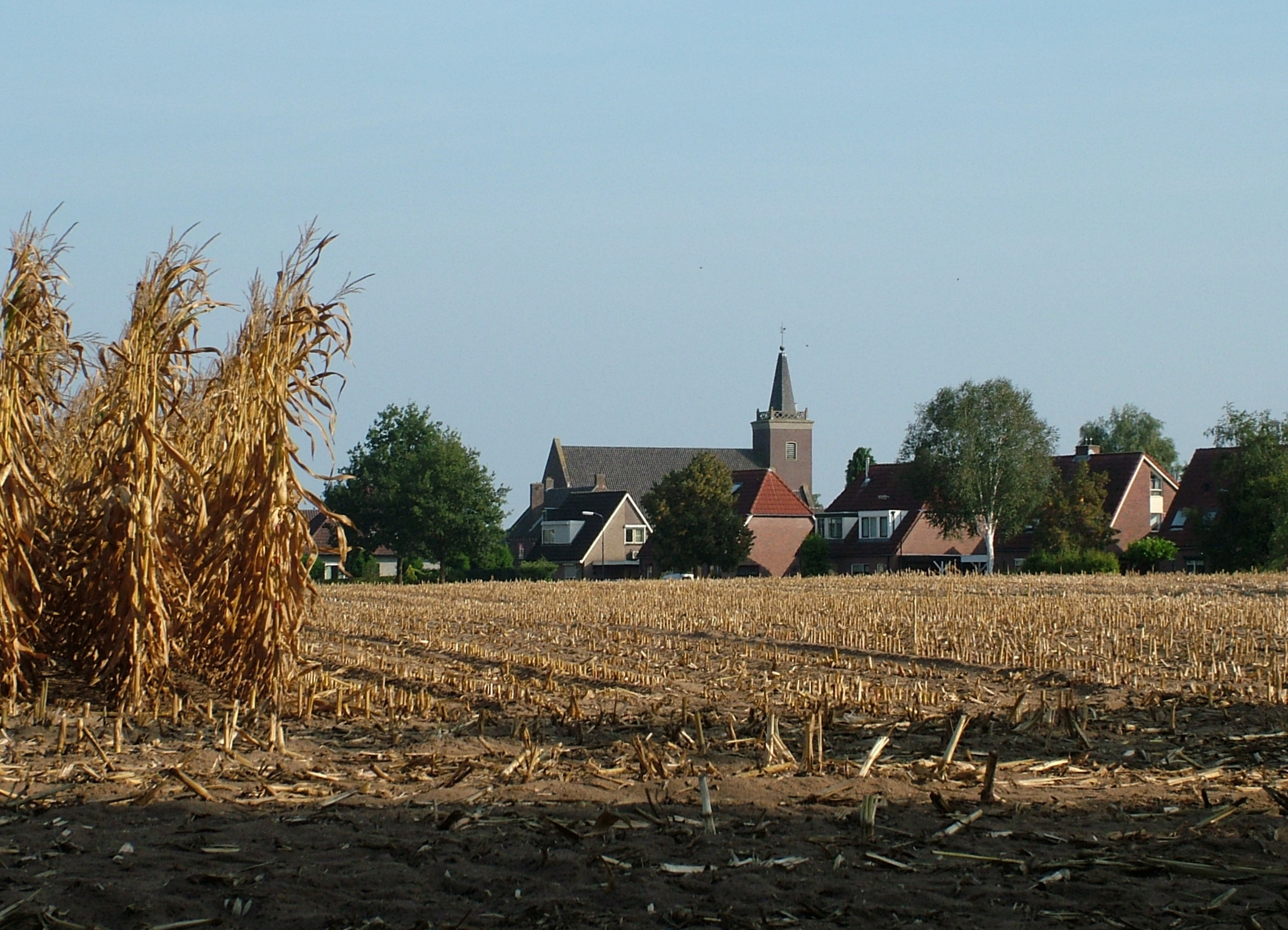 Bontebrug vanuit Lange Dijk gezien